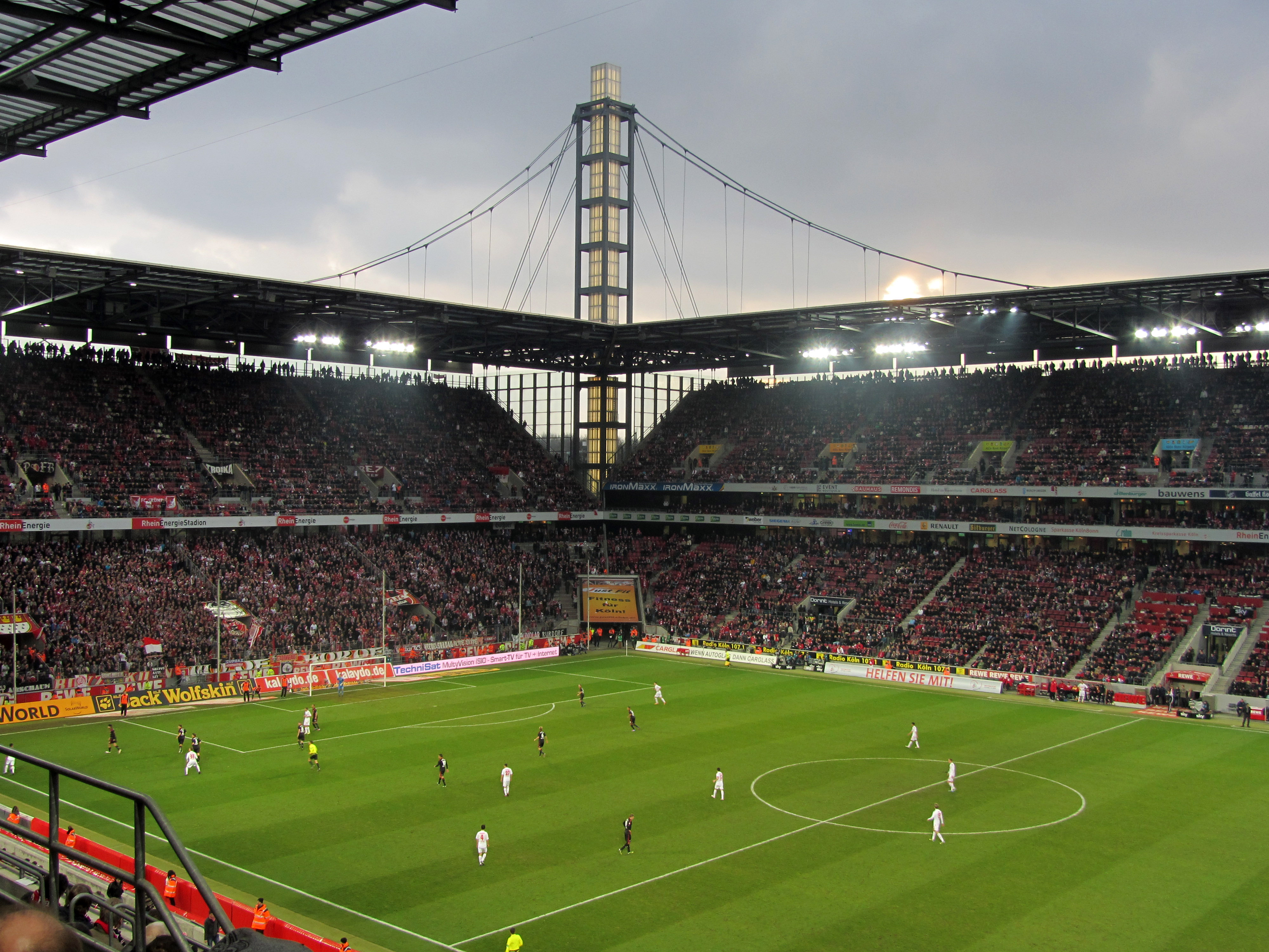 1. FC Köln against Bayer Leverkusen in the Bundesliga in February 2012.